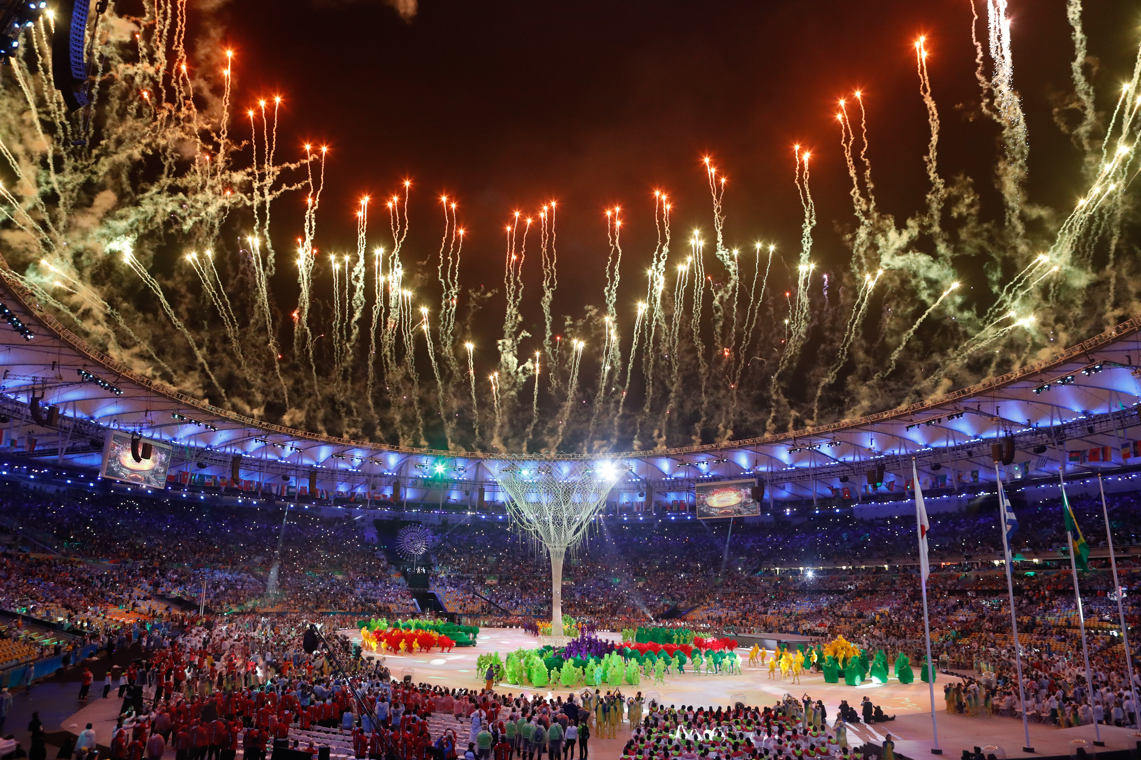 Rio de Janeiro - Cerimônia de encerramento dos Jogos Olímpicos Rio 2016, no Maracanã (Fernando Frazão/Agência Brasil)